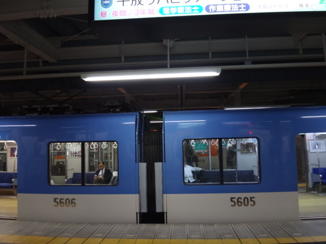 阪神電車・5500系 5505Fの車内照明が一部ＬＥＤに変更されている （阪神電車・尼崎駅にて）